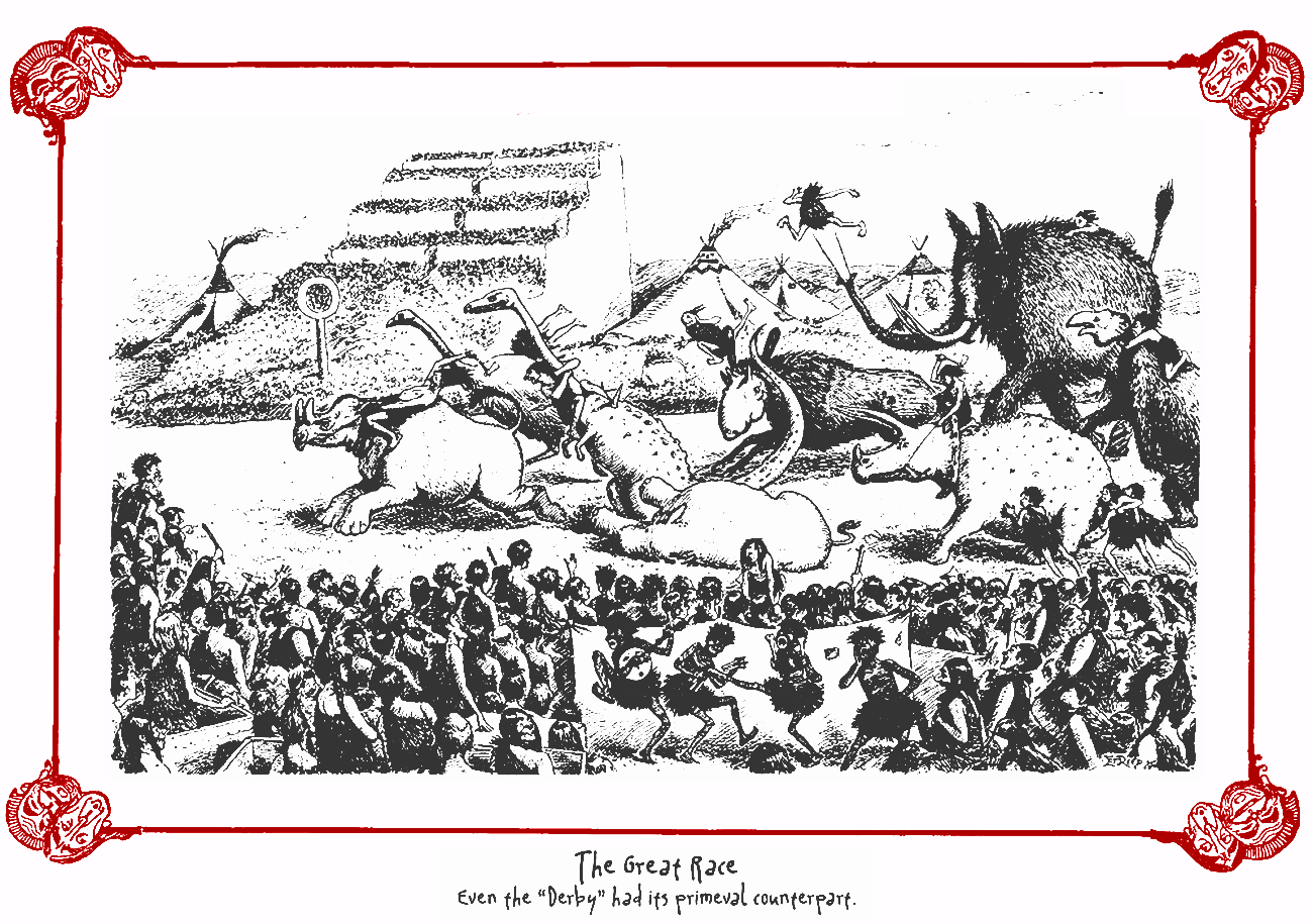 Cartum "A Grande Corrida" da série publicada na revista britânica "Punch", da série Prehistoric Peeps de Edward T. Reed.